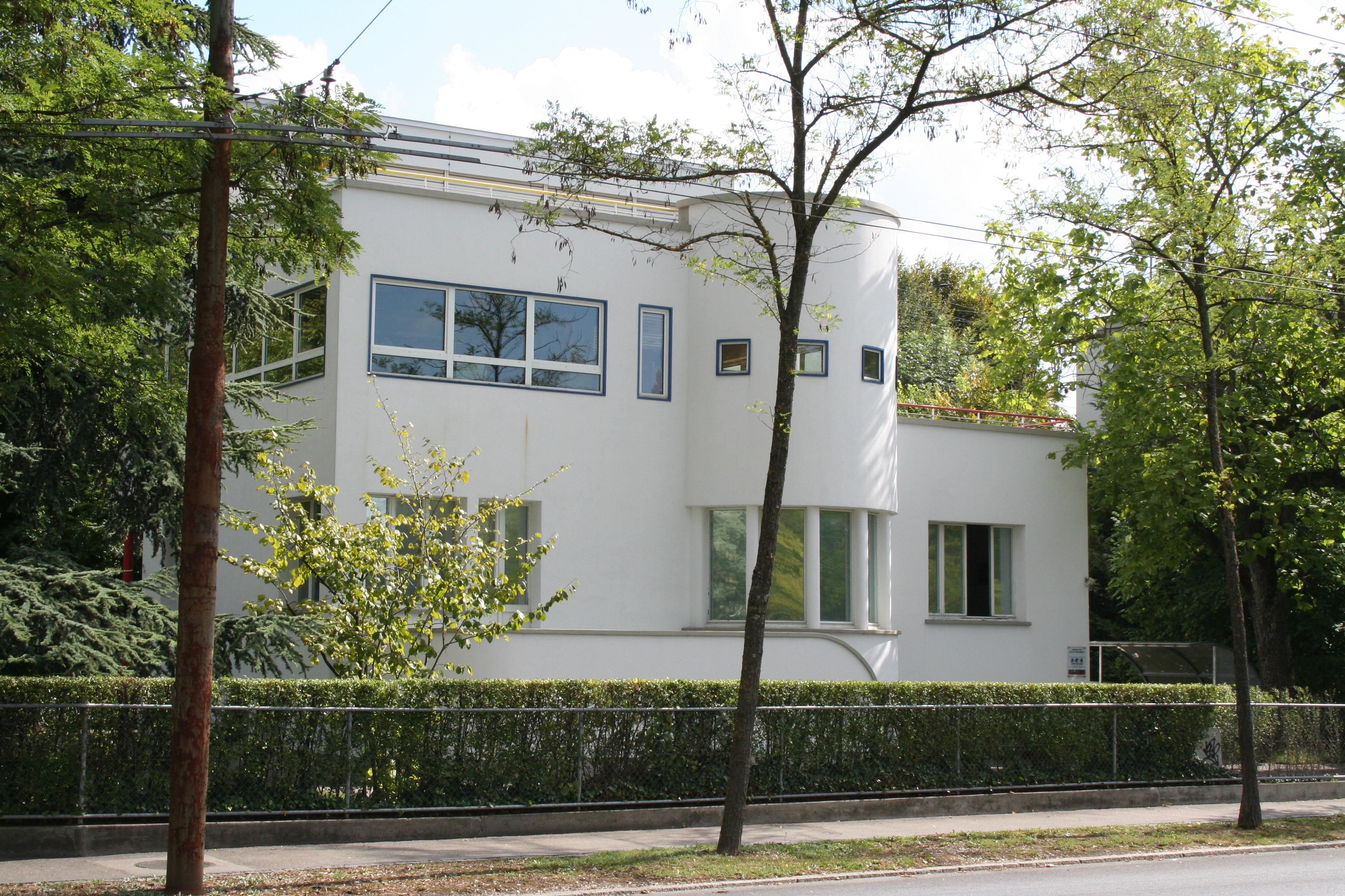 Eigenheime Ländtestrasse Biel Arch. Otto Schaub (1930)